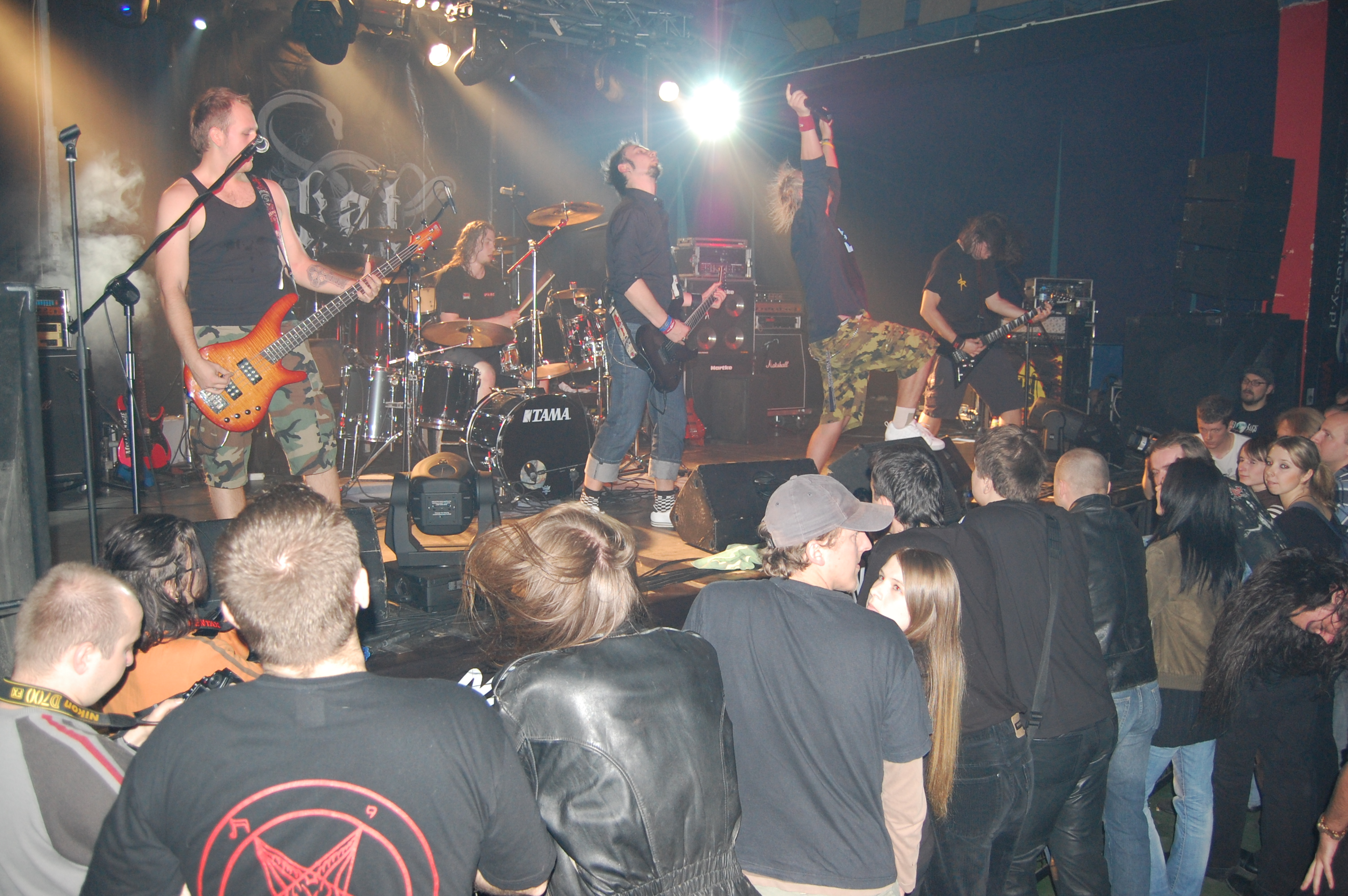 Zespół Chain Reaction podczas koncertu w warszawskim Klubie Progresja.